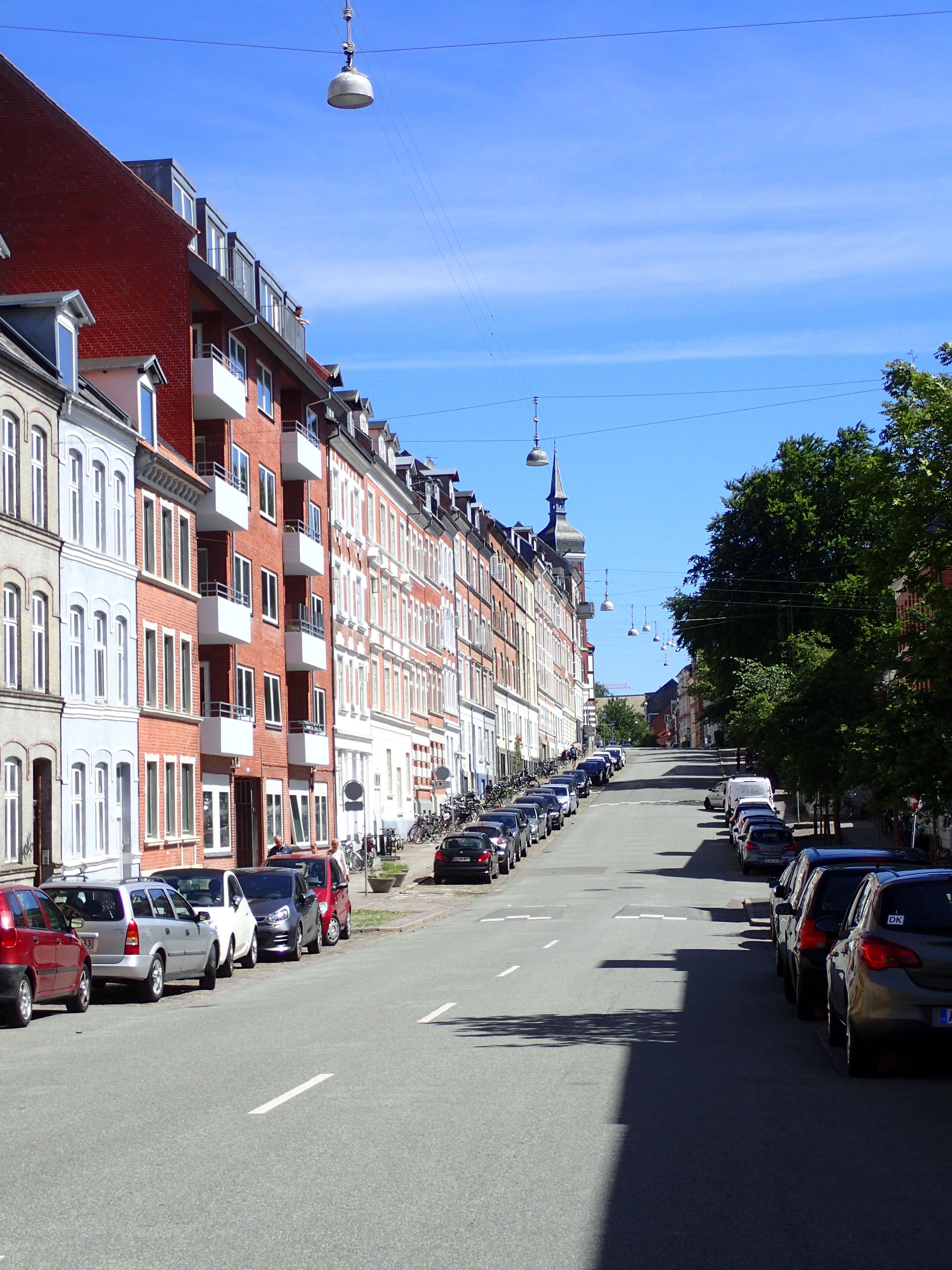 Samsøgade i Aarhus.